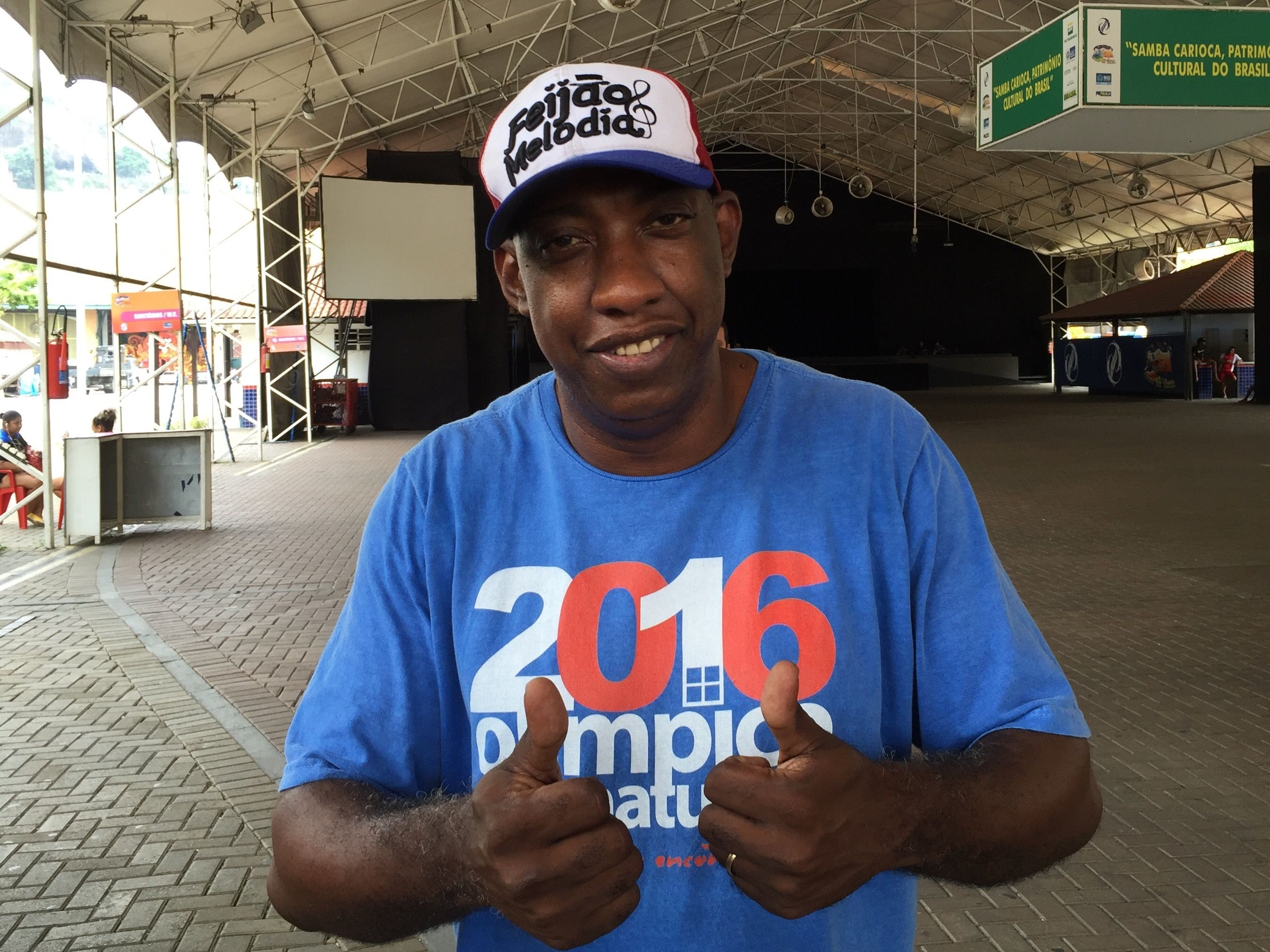 Ito Melodia. Foto: Cristina Indio do Brasil/Agência Brasil